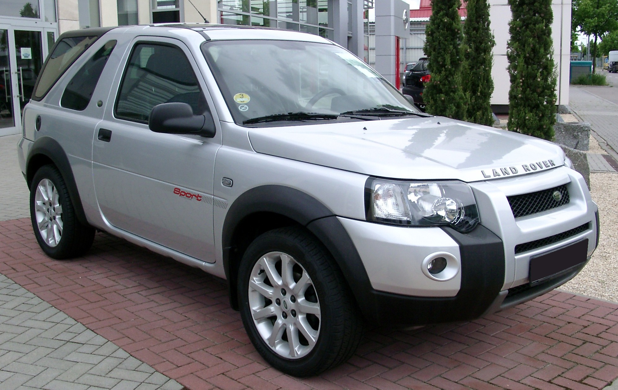 Land Rover Freelander I Facelift